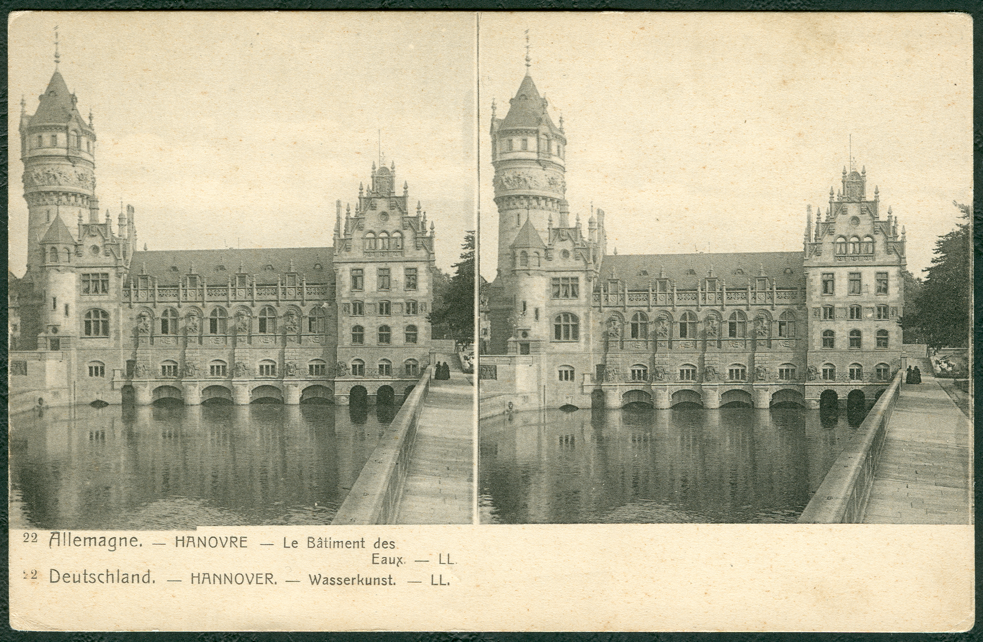 Stereoskopie in der Form einer zweisprachig untertitelten, nummerierten Ansichtskarte aus Deutschland, Motiv der Wasserkunst am Leineschloss in Hannover ...